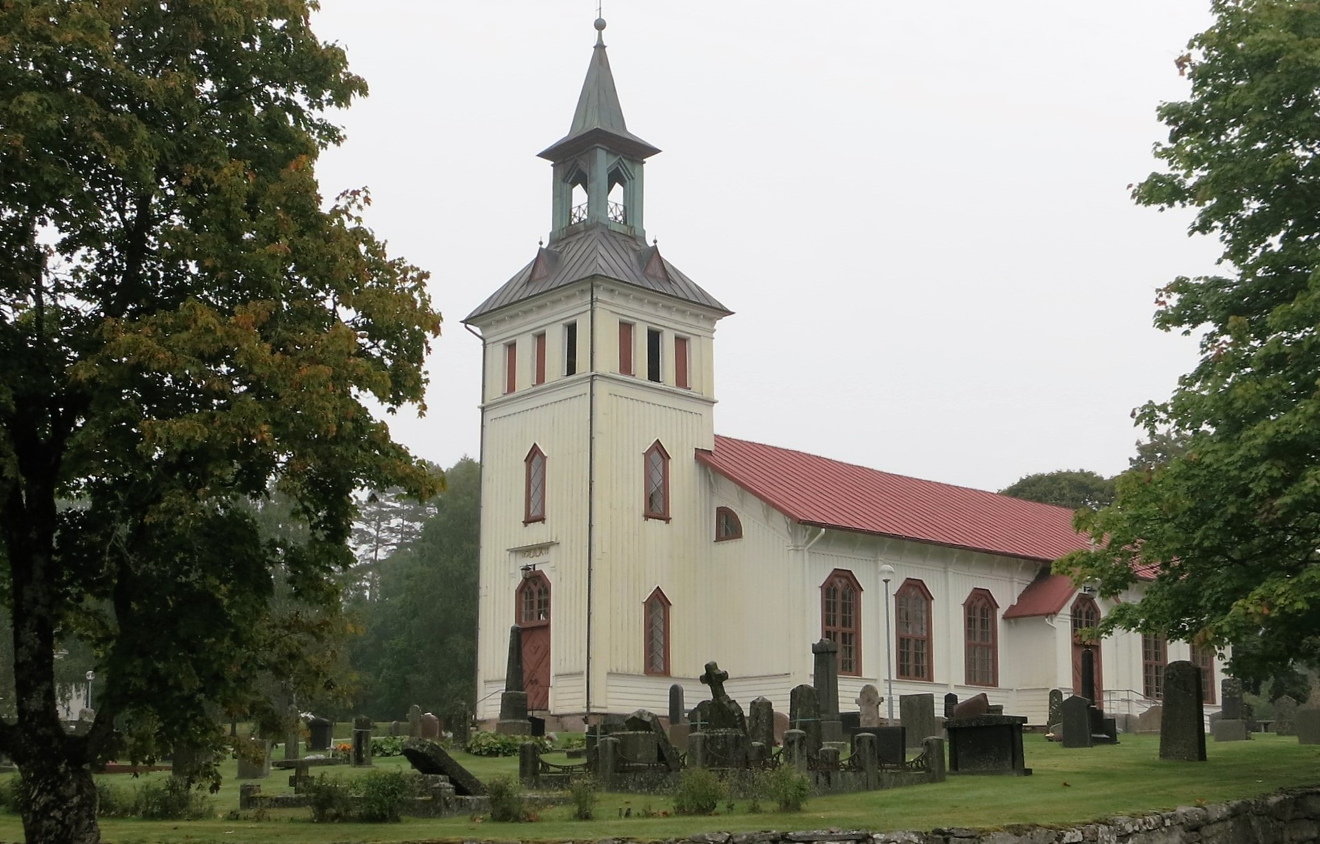 Mårdaklevs kyrka